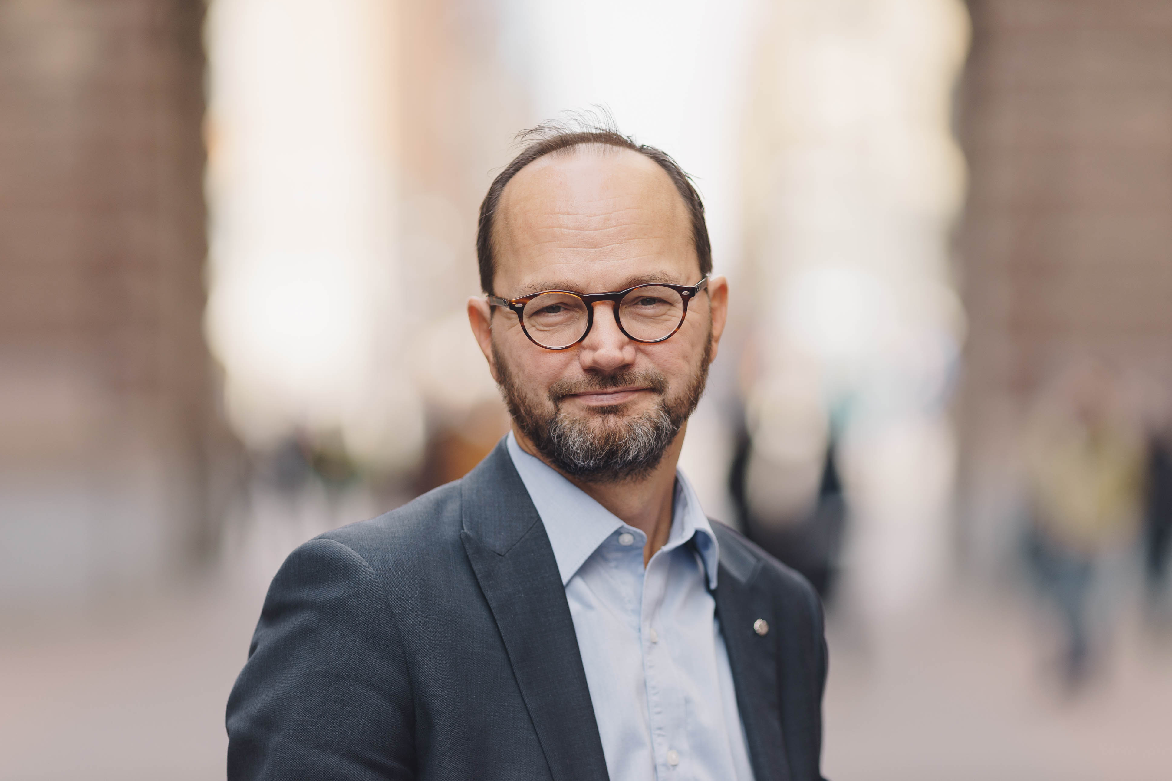 Tomas Eneroth, gruppledare för Socialdemokraterna Foto: Björn Nordqvist